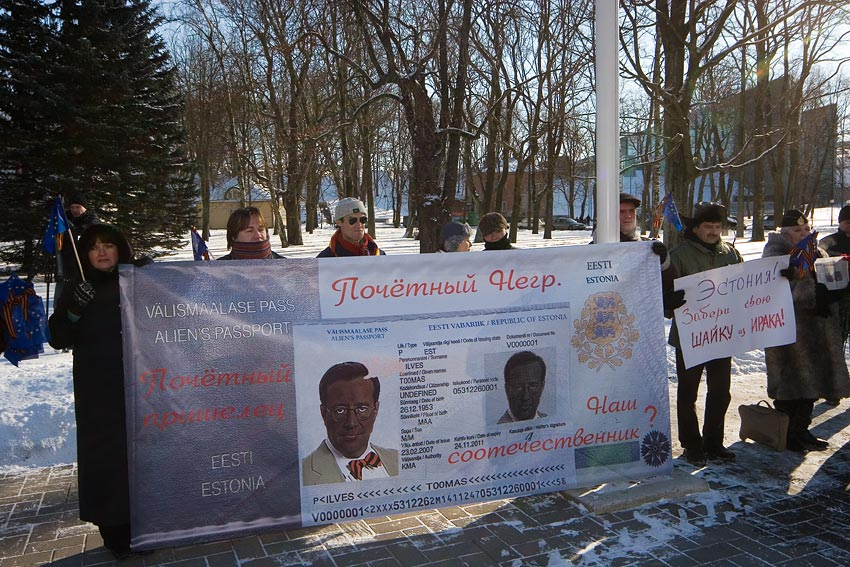 Пикет перед президентским дворцом в Кадриорге в защиту прав неграждан.